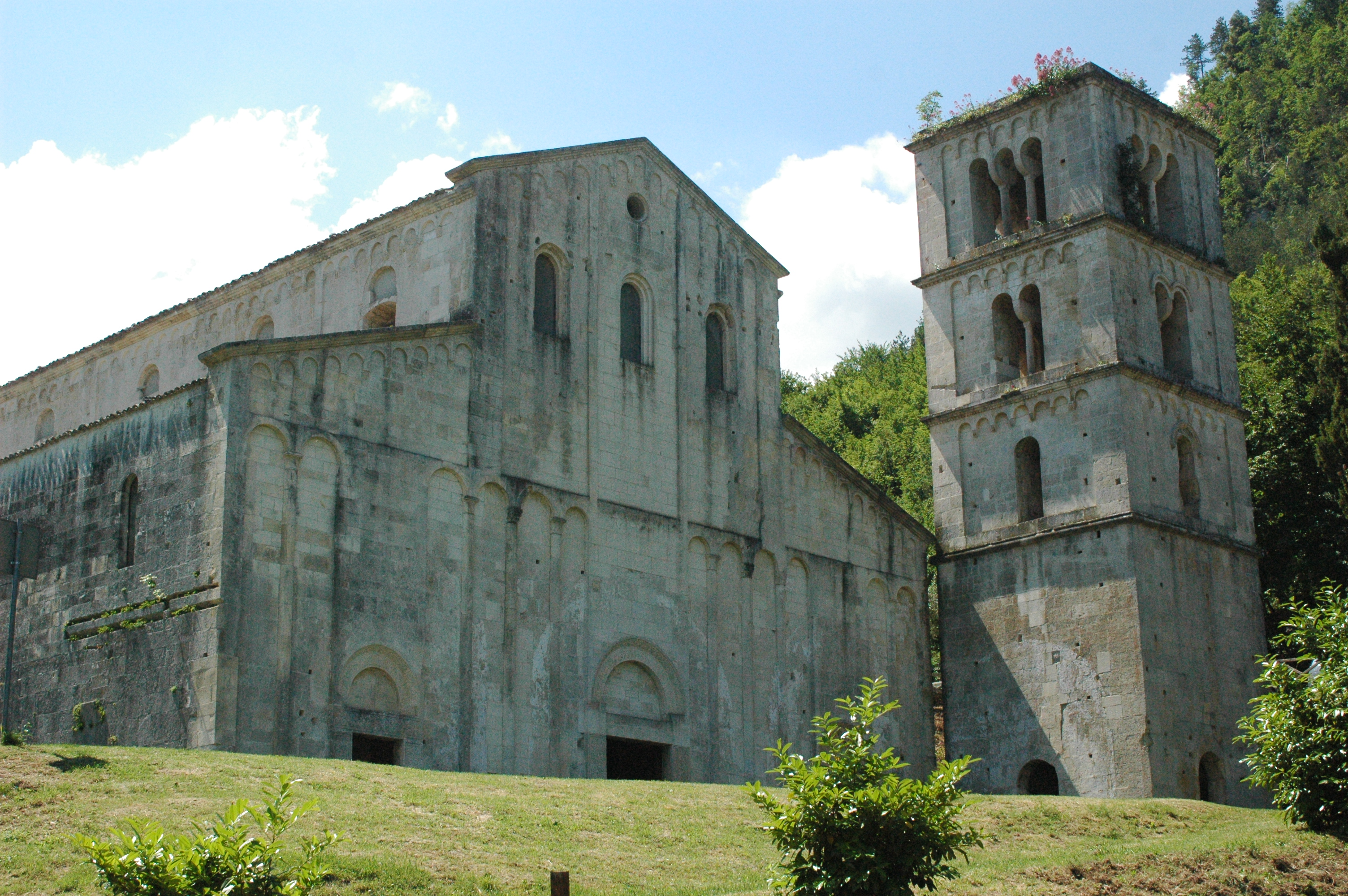 Abbazia di san Liberatore a Maiella (PE)